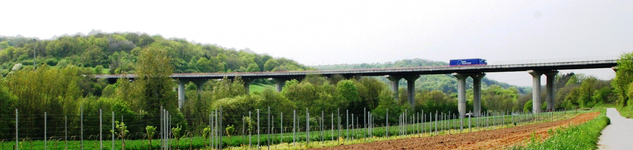 Sir-Viaduc. Kategorie:Brécken zu Lëtzebuerg Kategorie:Gemeng Mäertert